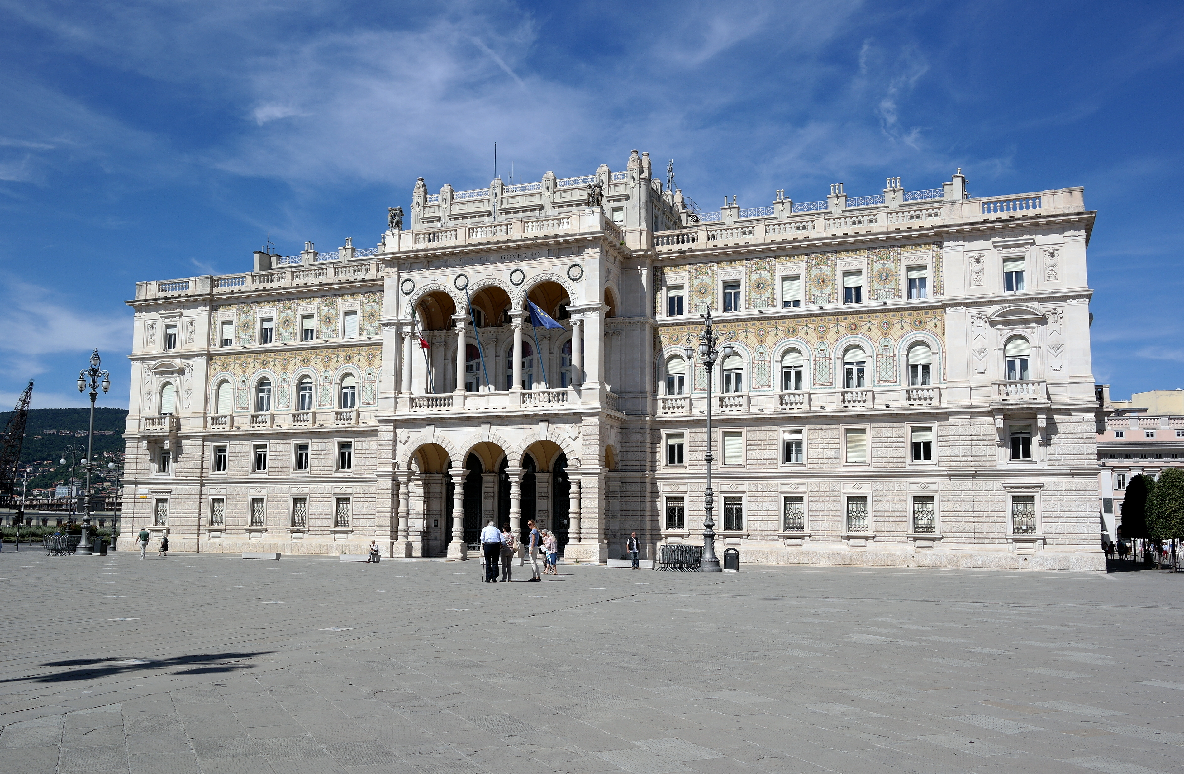 Palazzo della Prefettura, in Piazza Unità d'Italia, a Trieste